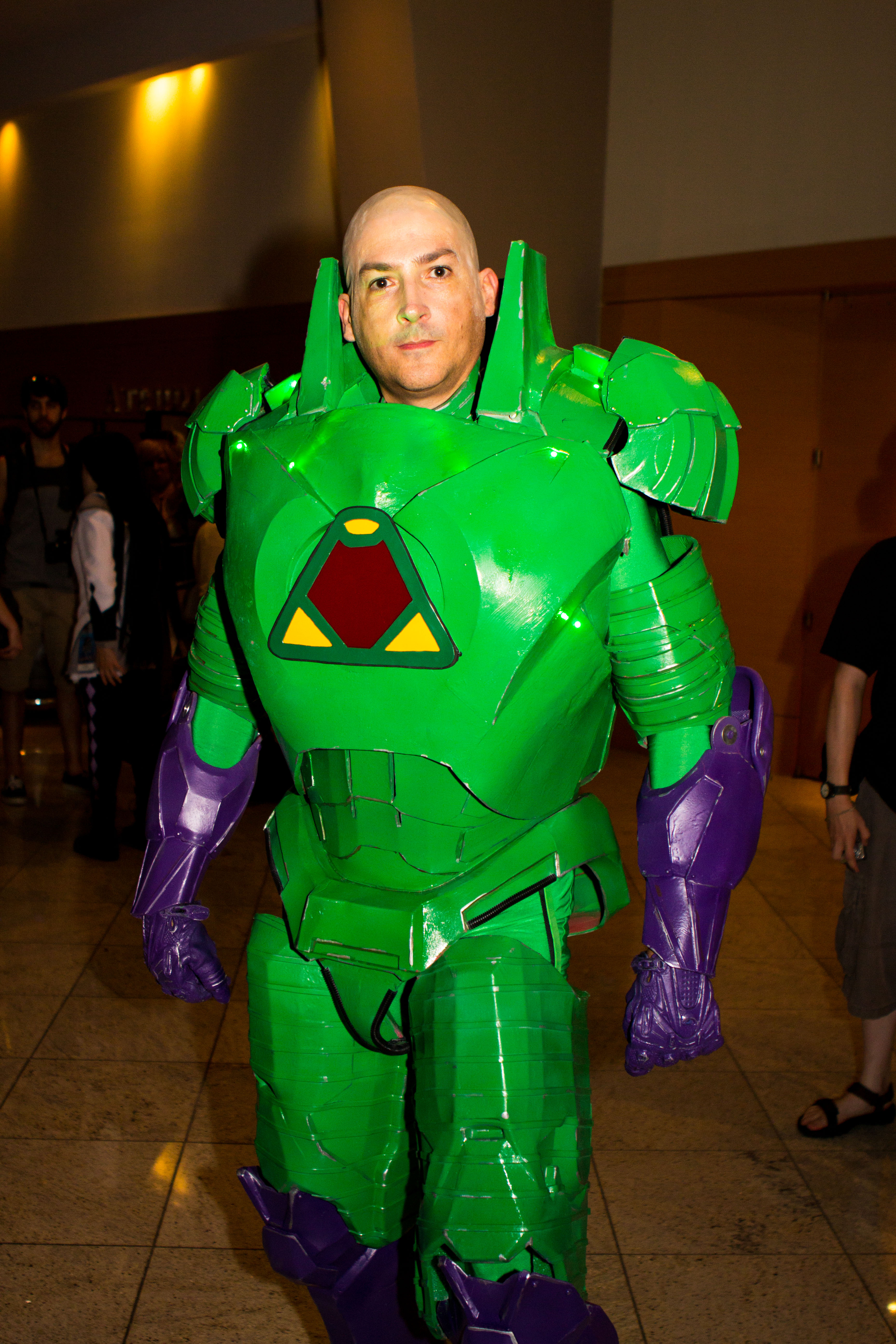 Cosplay at Dragon*Con 2013.